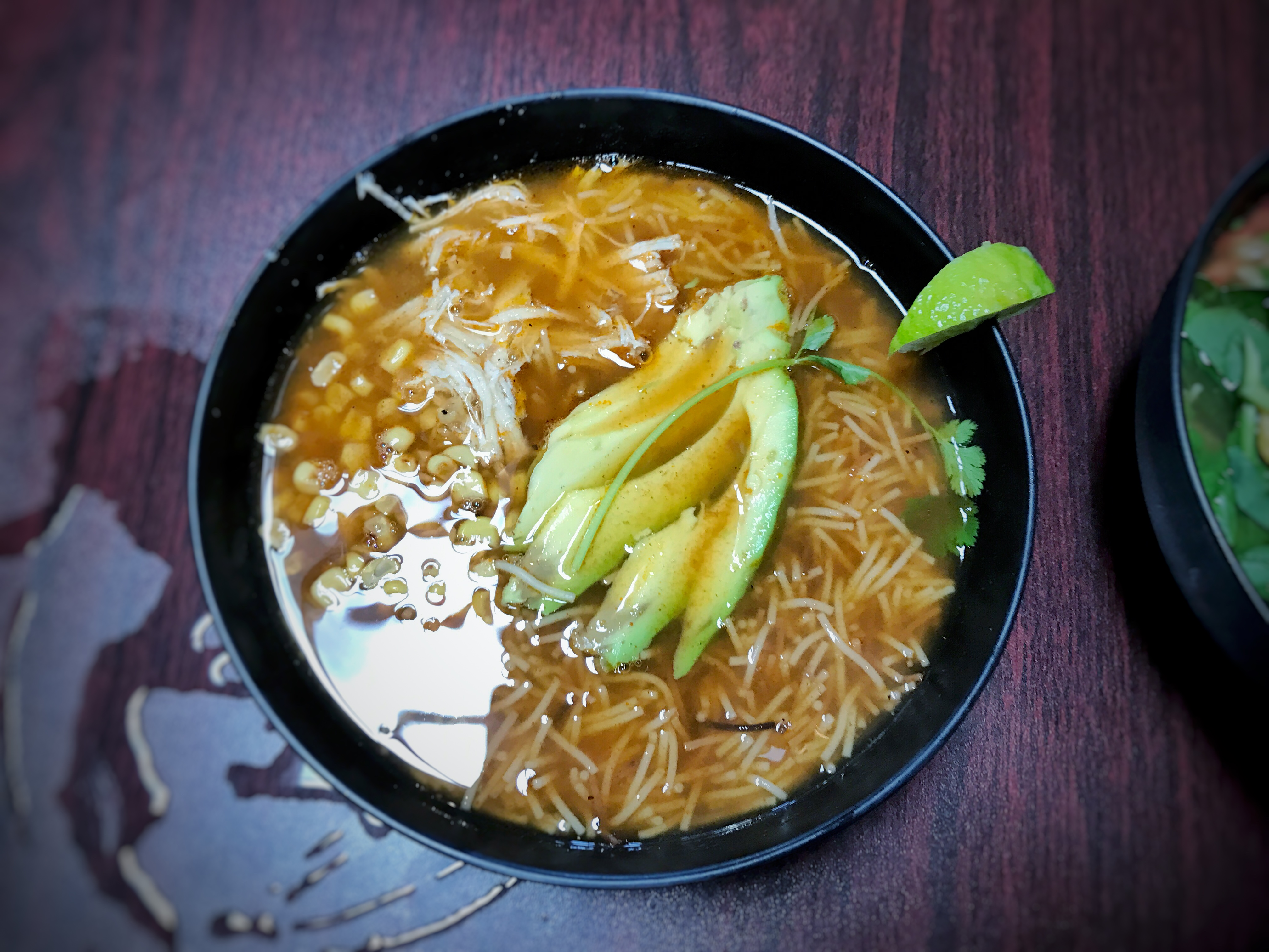 Colonia Publica, Whittier, CA